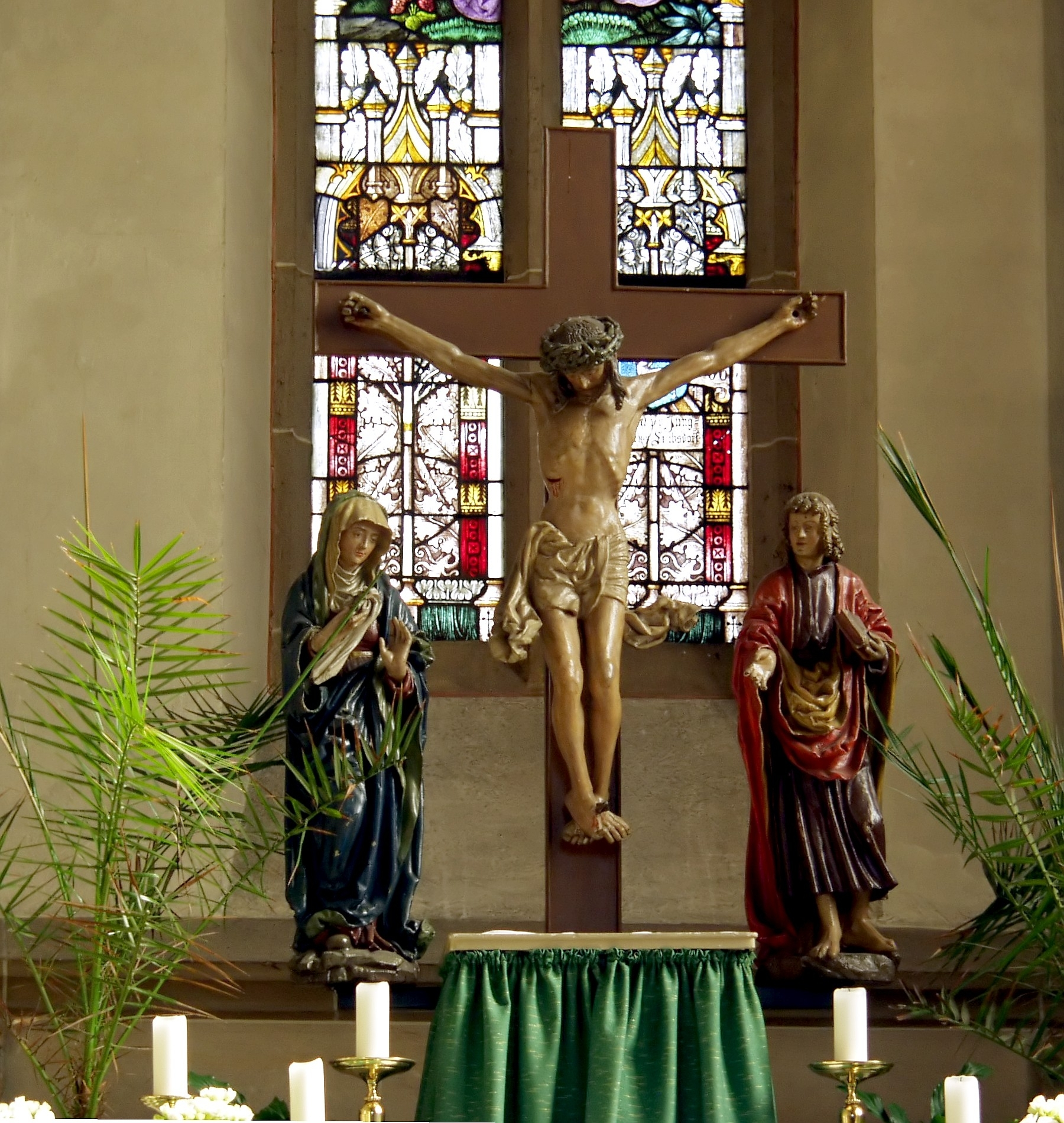 mittelrheinische Kreuzigungsgruppe aus der ersten Hälfte des 16. Jahrhunderts in St. Walburgis, Leubsdorf (Verbandsgemeinde Linz am Rhein)